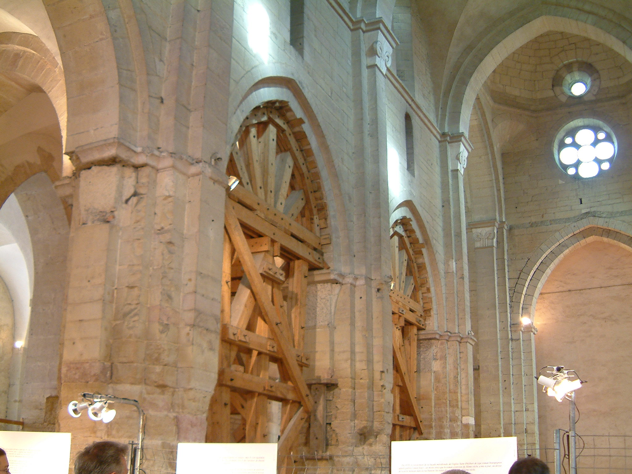 Église Saint-Philibert, Dijon, Bourgogne, FRANCE.